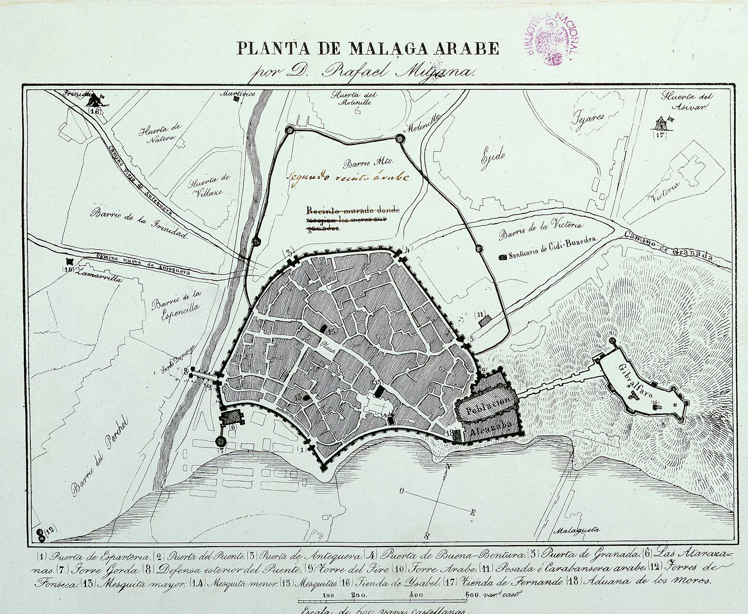 PID 91230 Tipo de Documento Material cartográfico Título Planta de Málaga árabe Málaga . Planos de población , Edad Media 18Ư- Autor Mitjana, Rafael . Editor [S.l. s.n. Fecha 18Ư-] Descripción Física 1 plano 22 x 31 cm Descripción Orientado con flecha con el N. al NE. del plano.- Relieve por sombreado